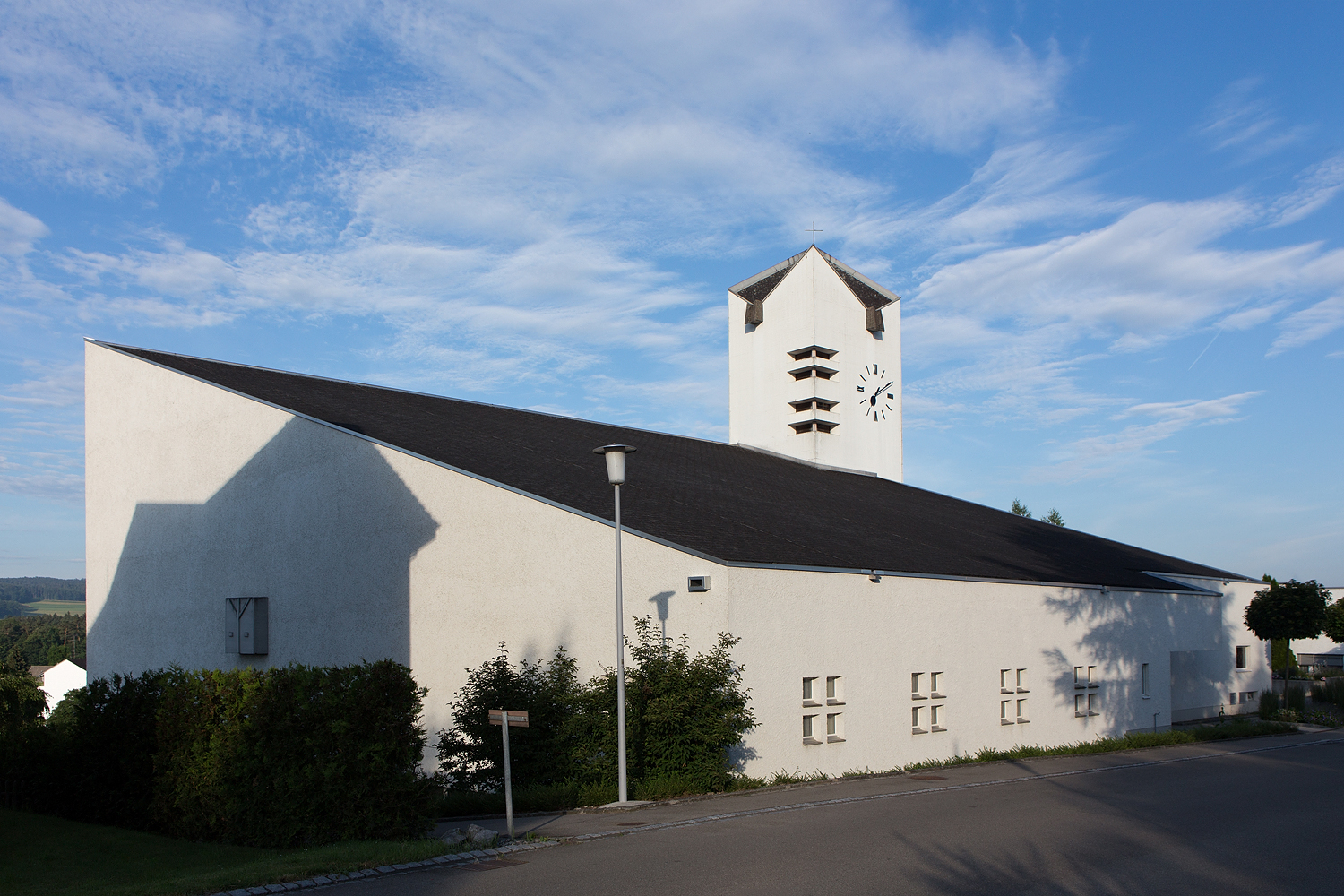 Katholische Kirche von Sulgen (Ostseite)